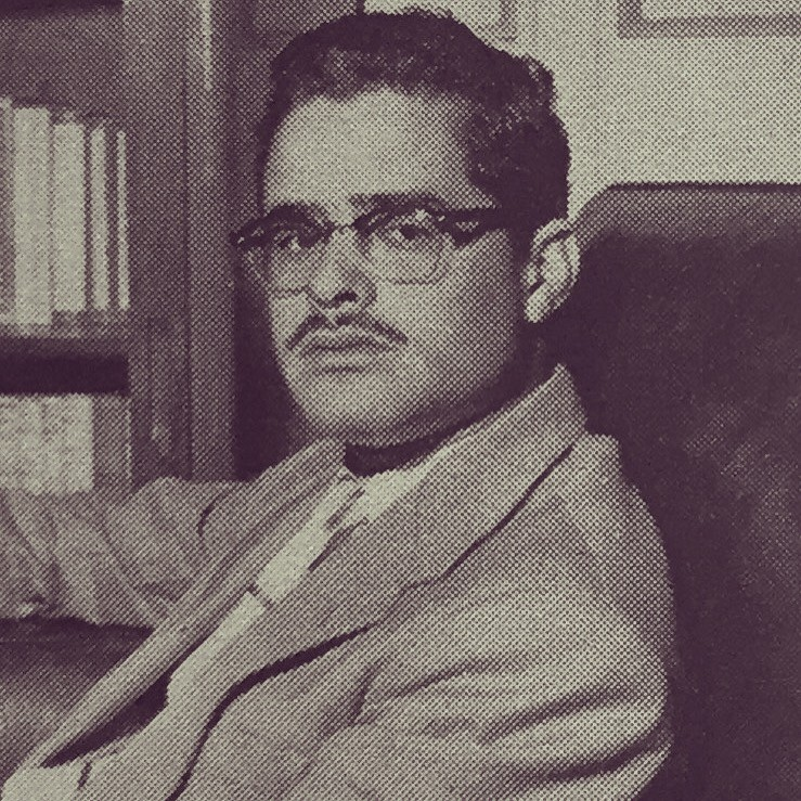 El escritor Adriano González León (1931-2008) en la década de 1950.